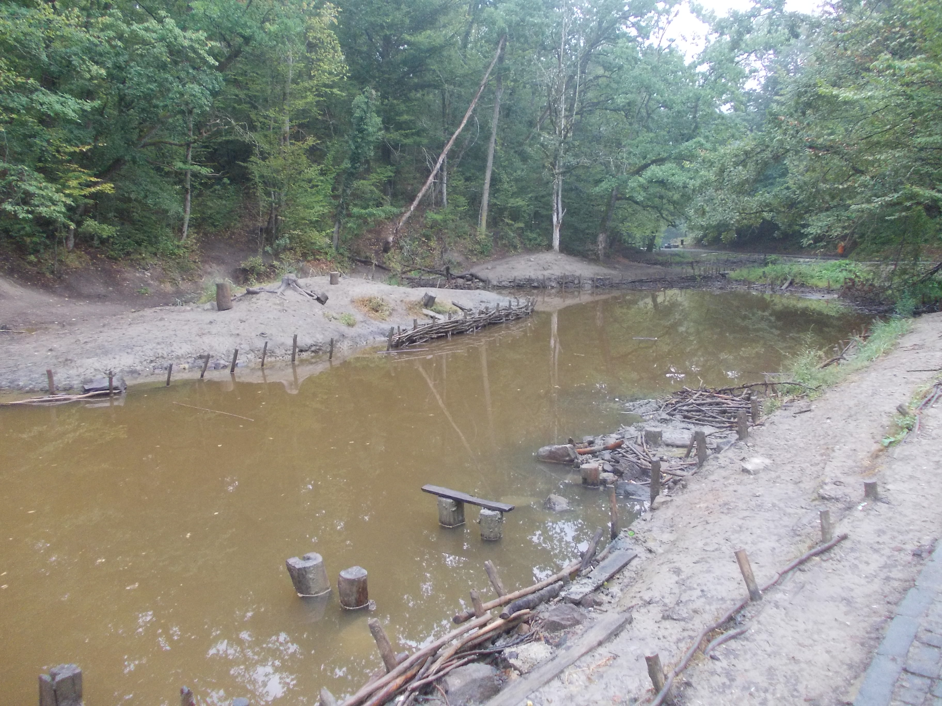 Lacu Roşu din Sovata, Mureş